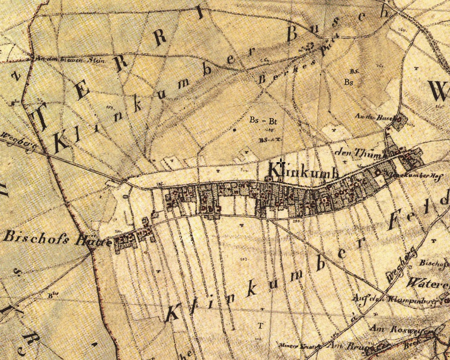 Tranchot Karte von 1806 (Bedeutung der Buchstaben im vorliegenden Kartenausschnitt: T = Ackerland [Terre labourables]; Br = Heide [Bruyères]; B = Wald, ungegliedert [Bois]; Bt = Niederwald [Bois taillis]; Bhf = Hochwald [Bois haute futaie] )